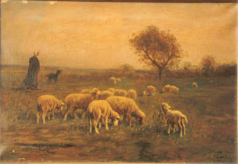 Pastora con Ovejas obra por Albert Charpin